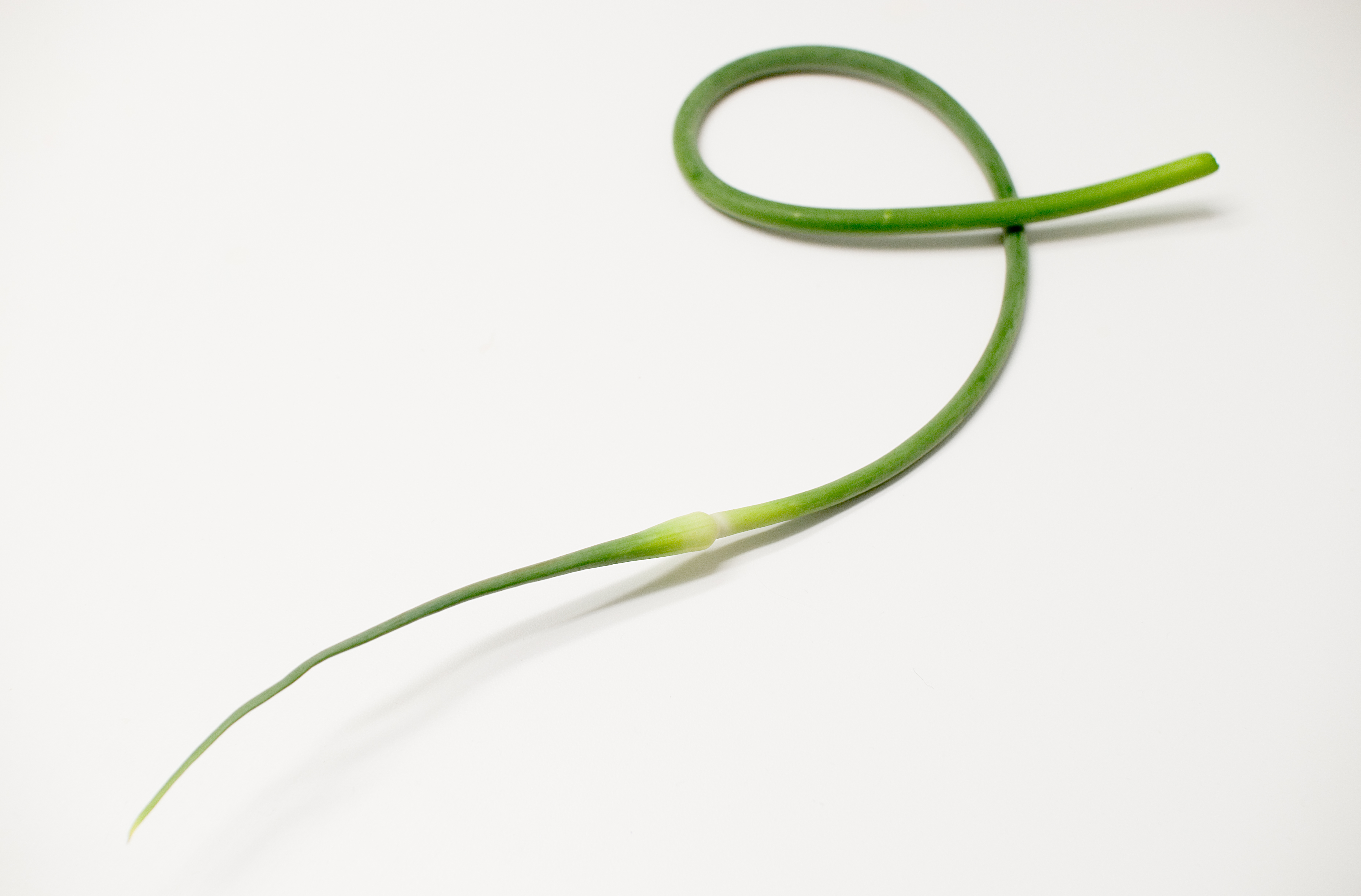 A garlic scape.